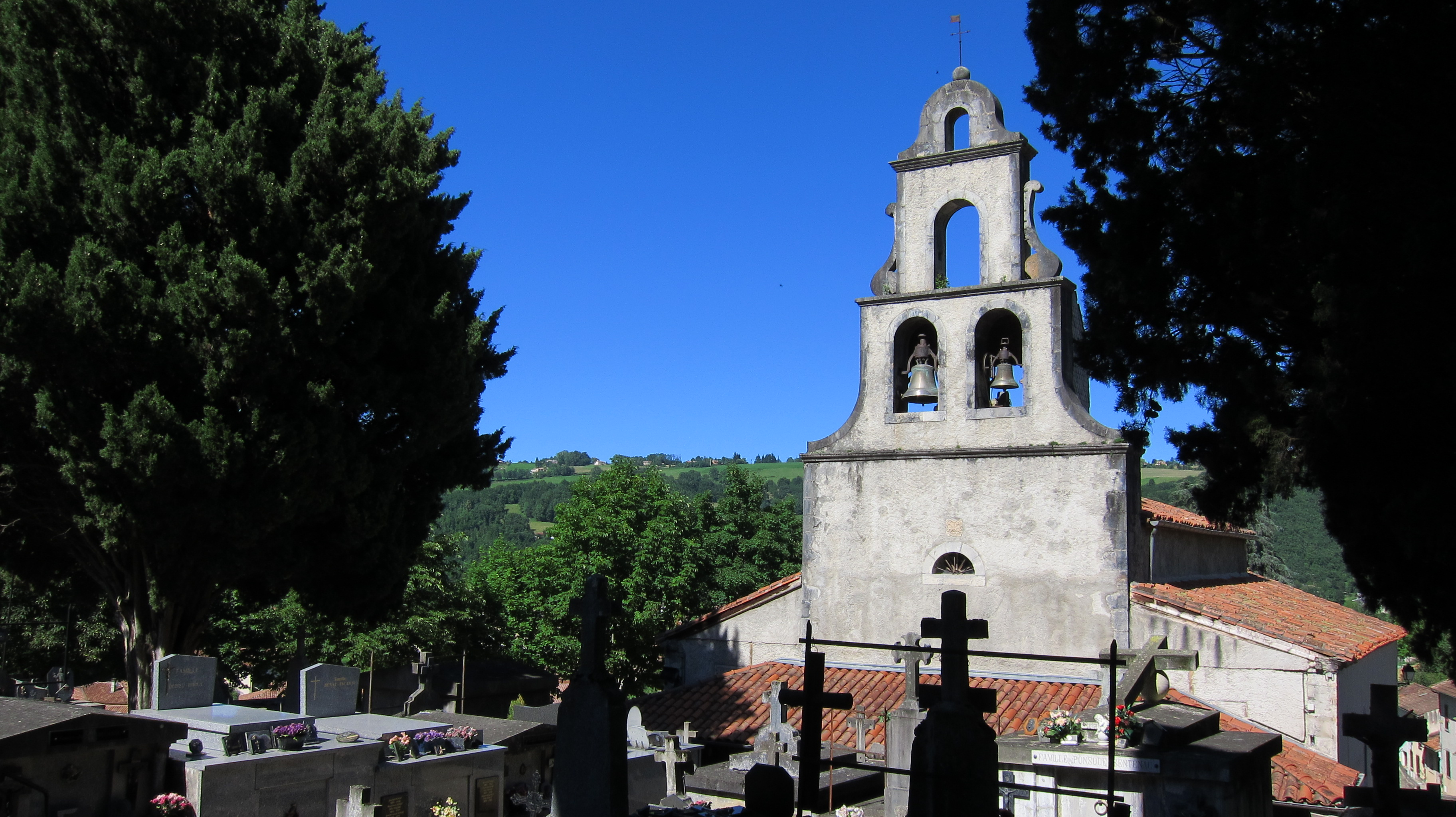 Eycheil (Ariège, France) : L'église Saint-Jean-Baptiste.